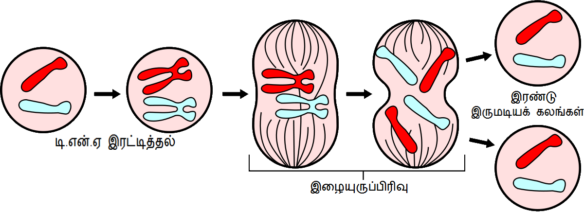 இழையுருப்பிரிவுக்கு முன்னும் பின்னும்:அடிப்படை